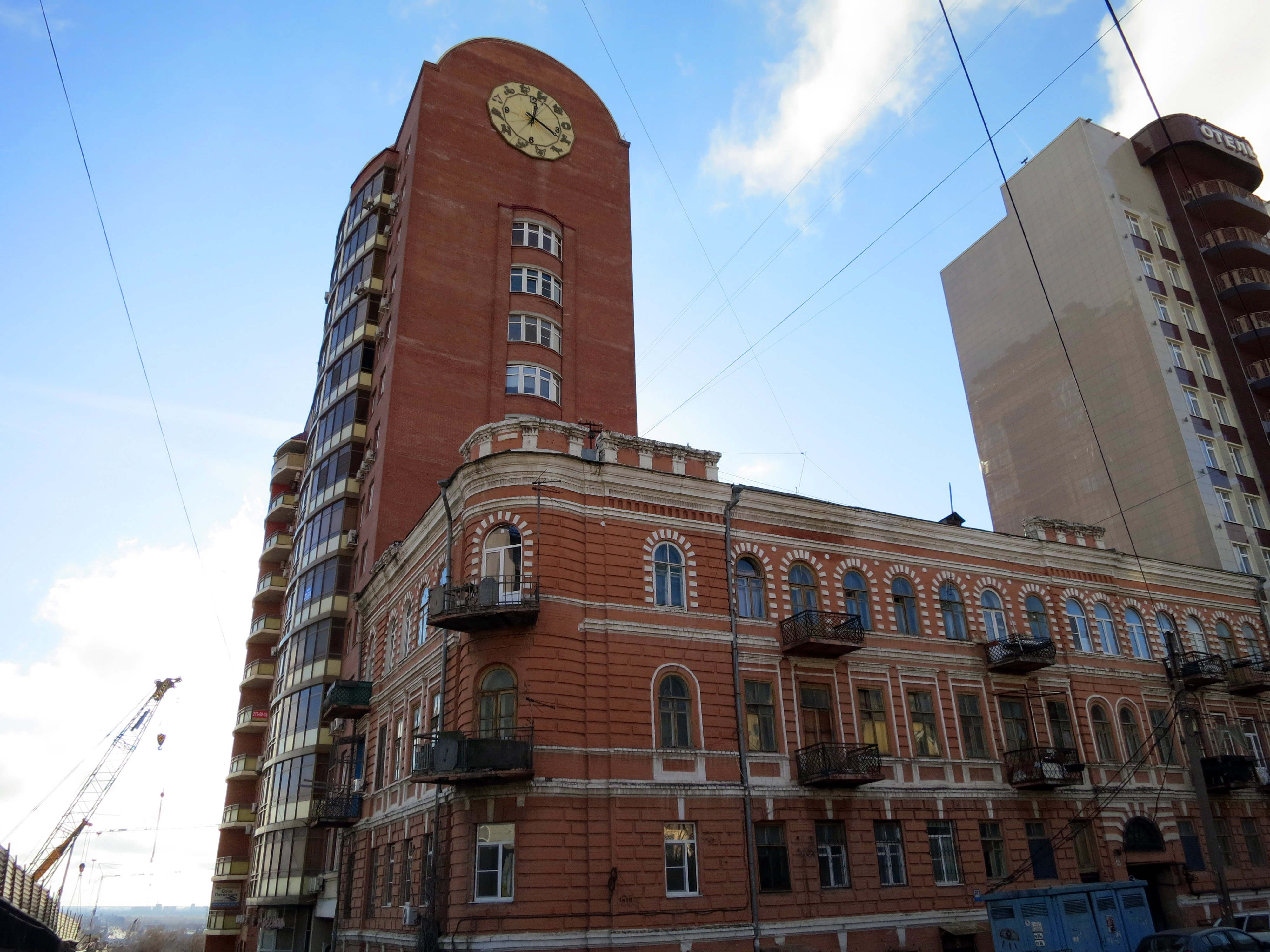 Доходный дом Е.П. Ляхмаер: улица Ульяновская, 60/11, проспект Ворошиловский, литер А, Ростов-на-Дону, Ростовская область